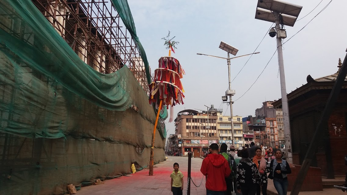 नेपाली: वसन्तपुरमा विधिपूर्वक ठड्याइएको चिर